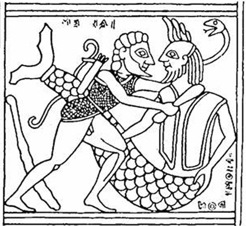 Halios geron im Kampf mit Herakles. Kopie einer argivische Bronzeplatte